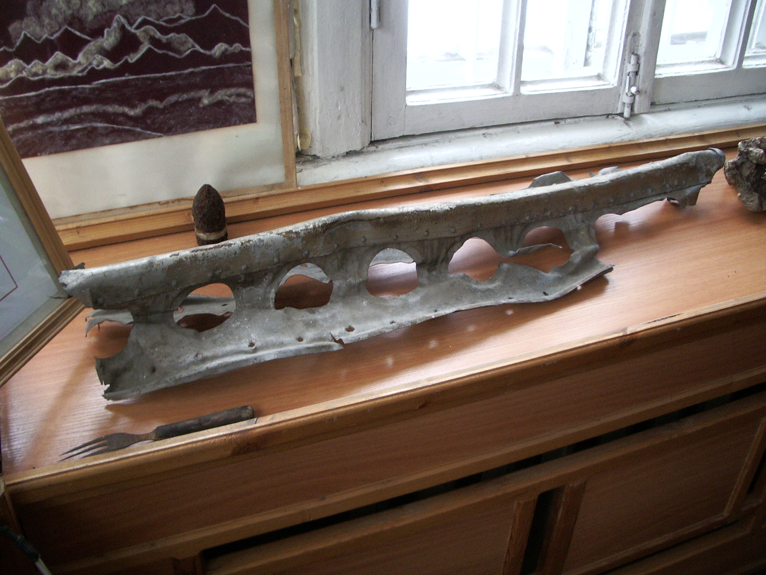 Обломок самолёта АНТ-20 «Максим Горький», упавшего 18 мая 1935 года на посёлок "Сокол". Музей посёлка "Сокол".